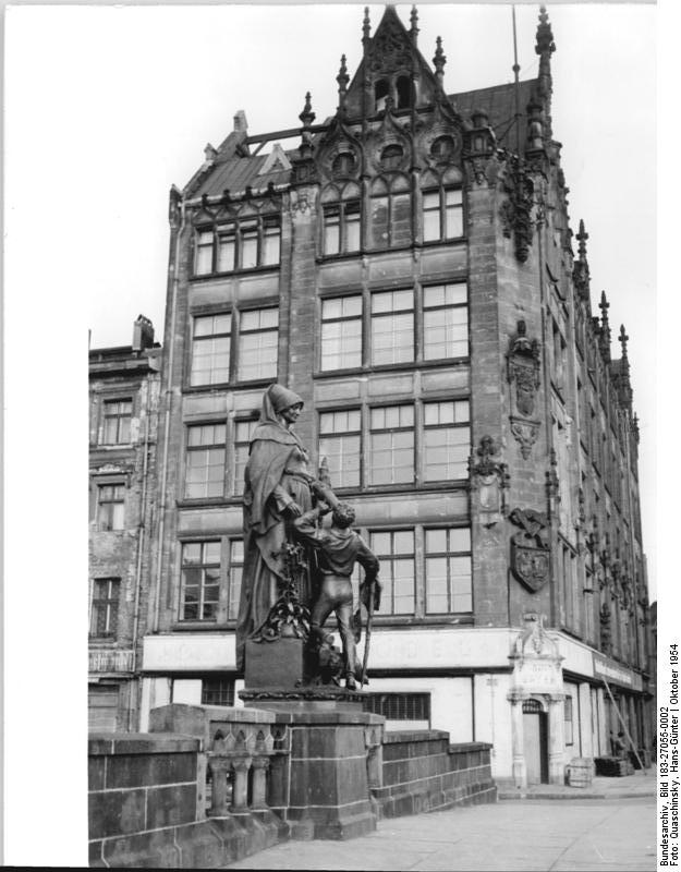 Zentralbild-Quaschinsky, 20.12.1954 "Heilige Gertraud" wieder auf der Gertraudenbrücke in Berlin. UBz: Seit dem 6.10.1954 steht die Bronzestatue der "Heiligen Gertraud" wieder auf der Gertraudenbrücke, die den Spittelmarkt mit Alt-Cölln verbindet.